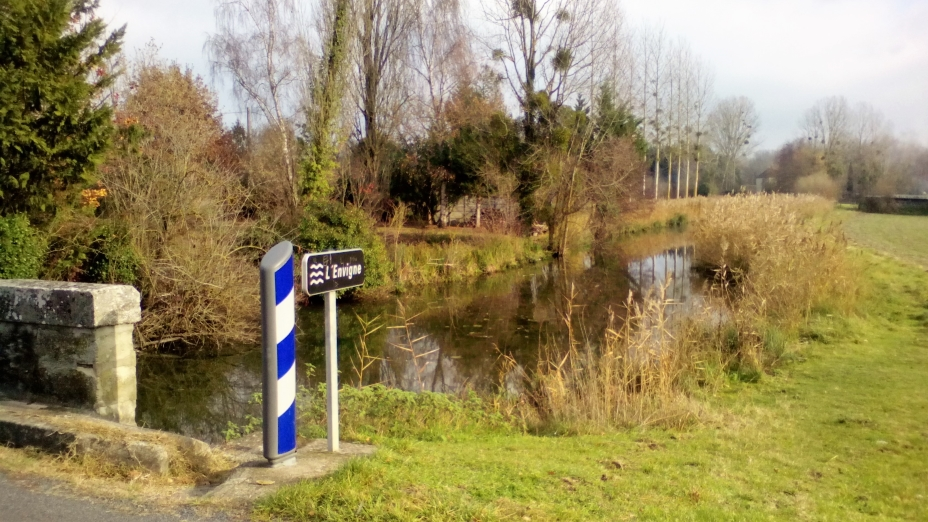 La rivière l'Envigne, cours d'eau entre Saint-Genest d'Ambière et Ouzilly dans le Lencloîtrais.